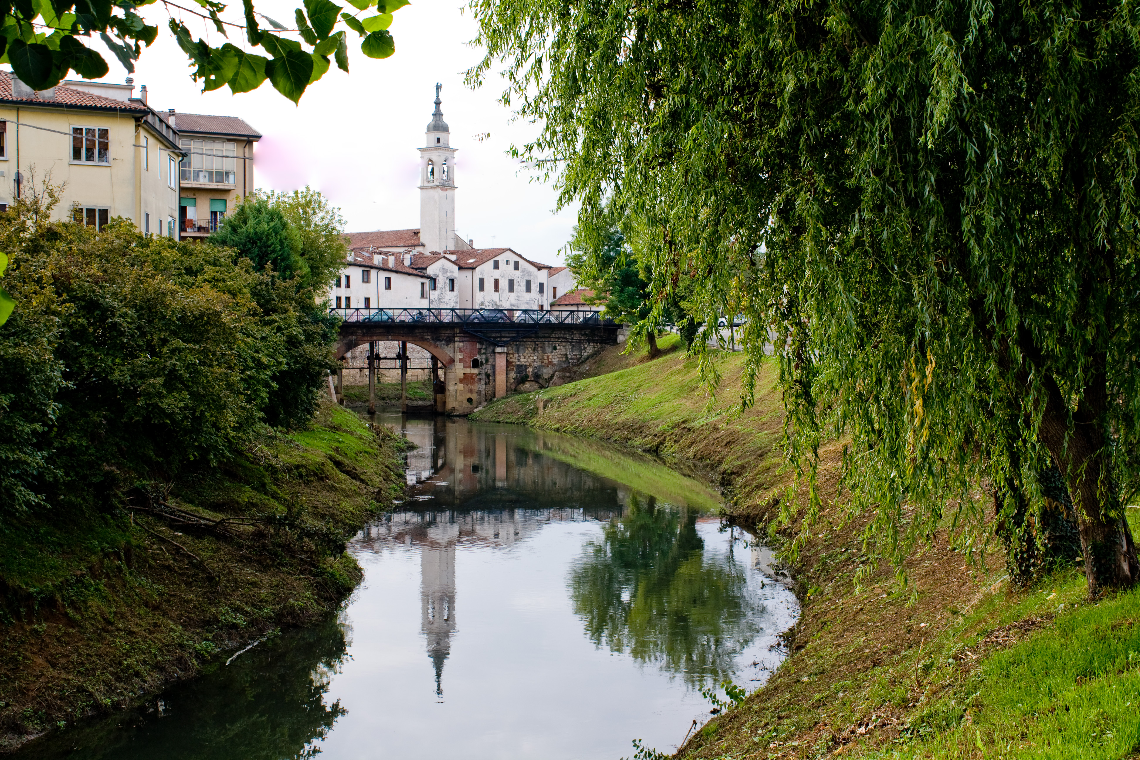 Ponte sul Retrone e chiesa di Santa Caterina, in Vicenza